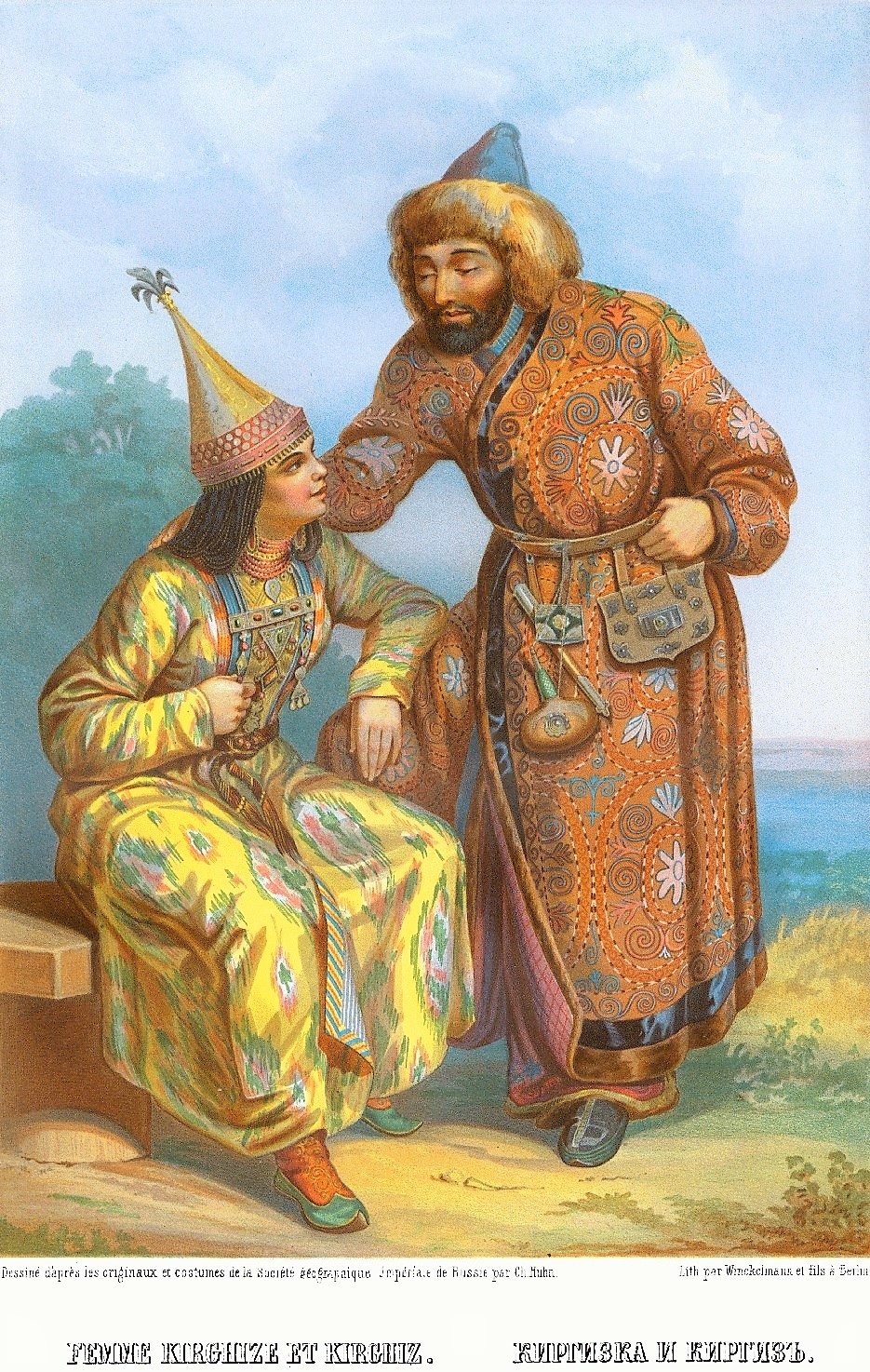 Киргизы. Этнографическое описание народов России Густава-Федора Христиановича Паули